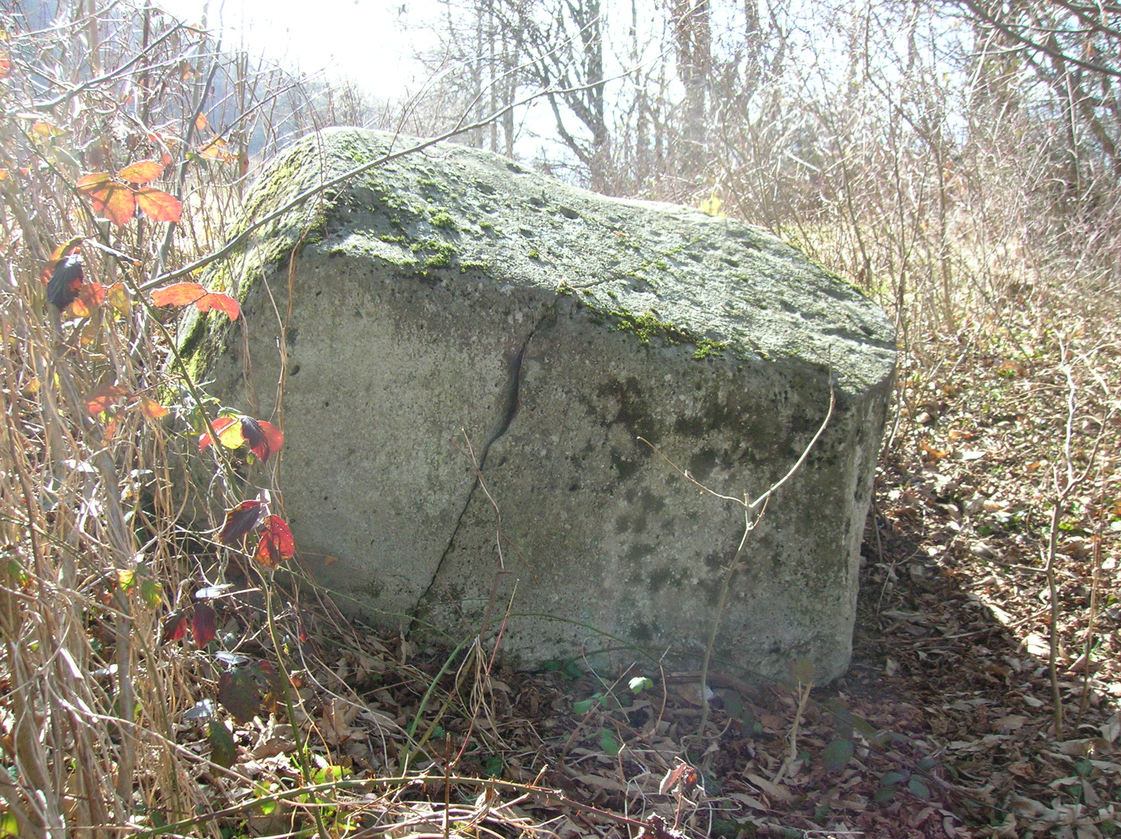 Pierre du Bigot, hameau du Bigot, Saint-Martin d'Hères, Isère, France.